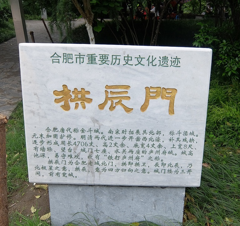 合肥城墙北门原址石碑